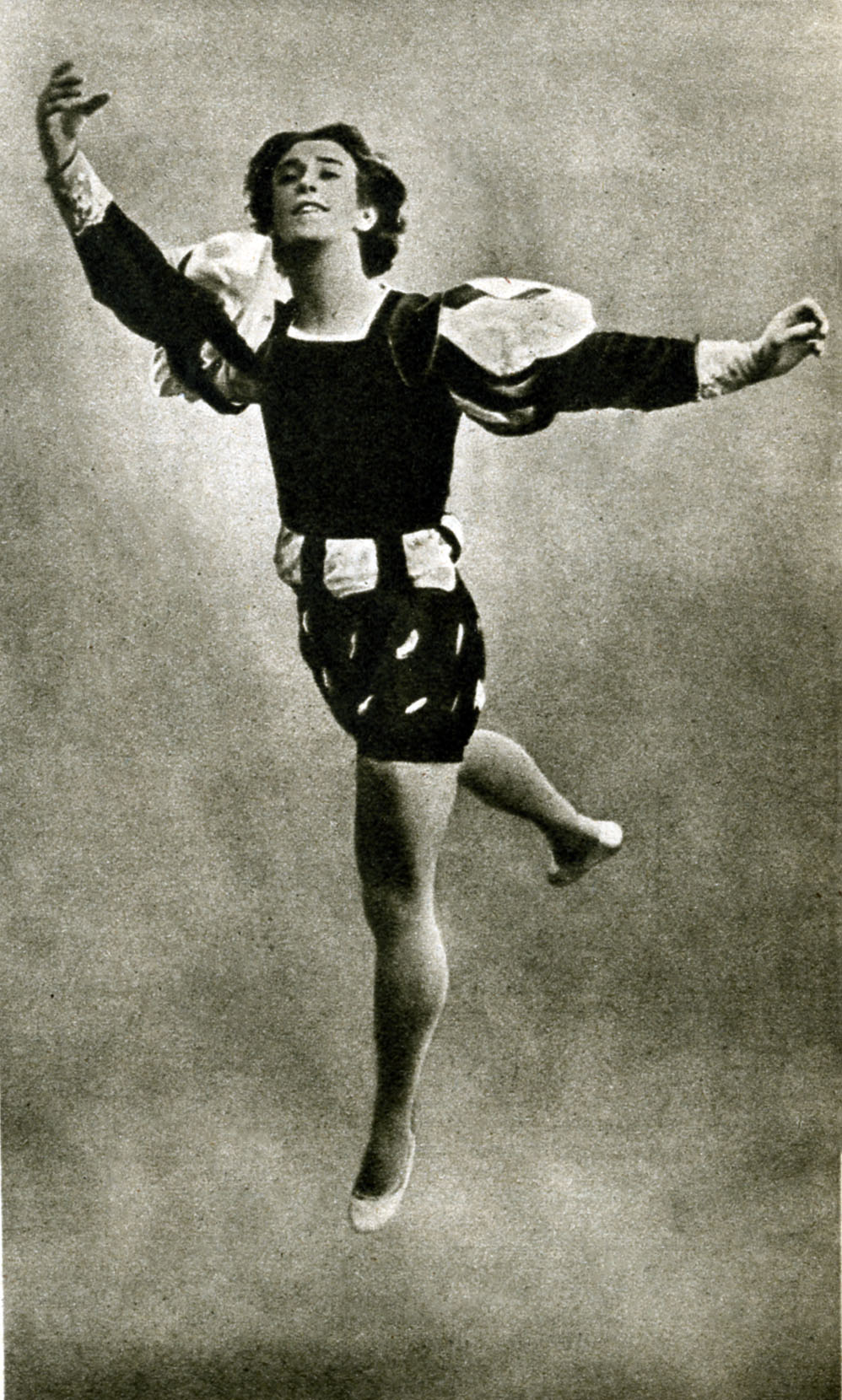 Nijinski